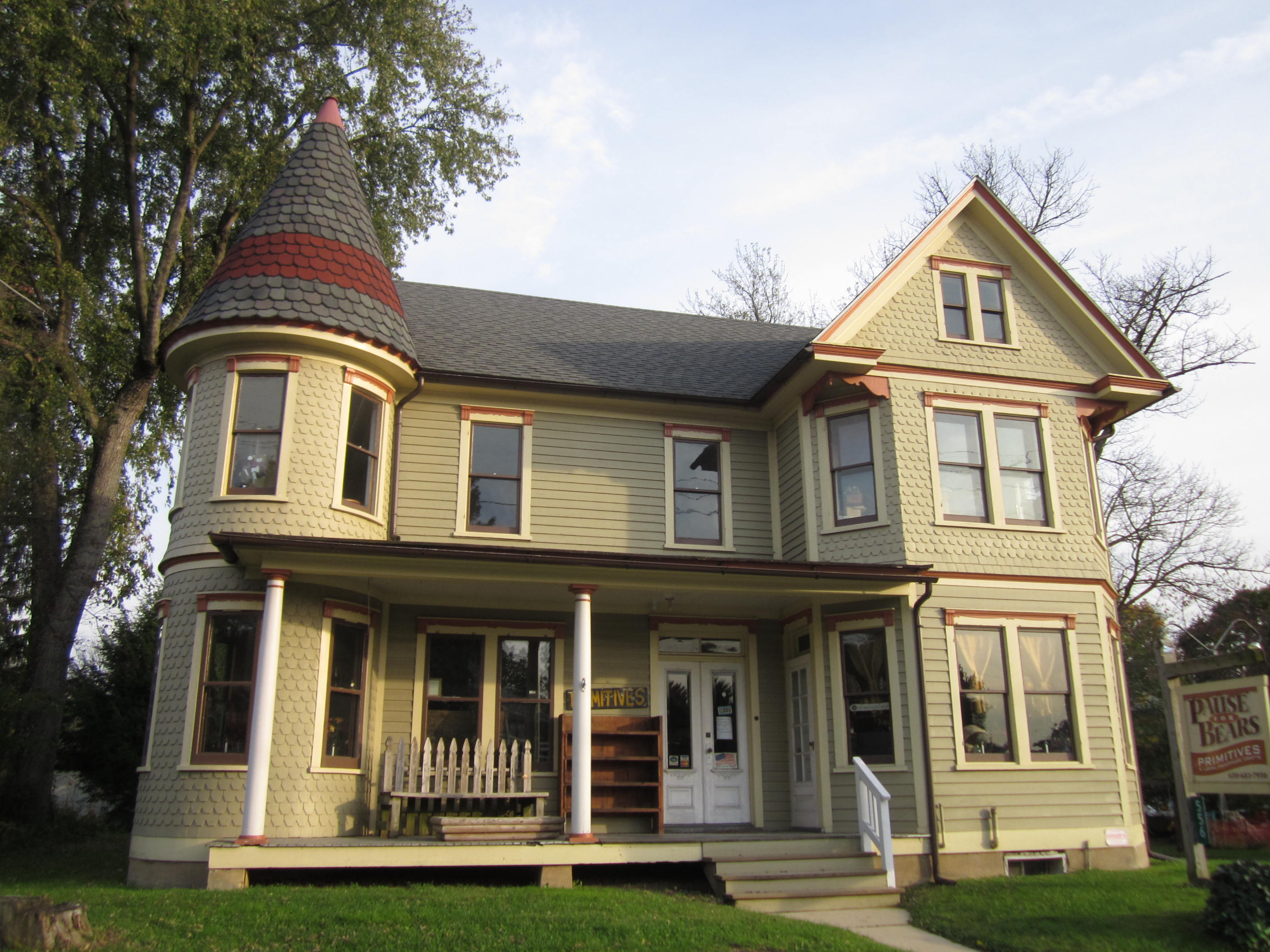 Kresgeville, Pennsylvania